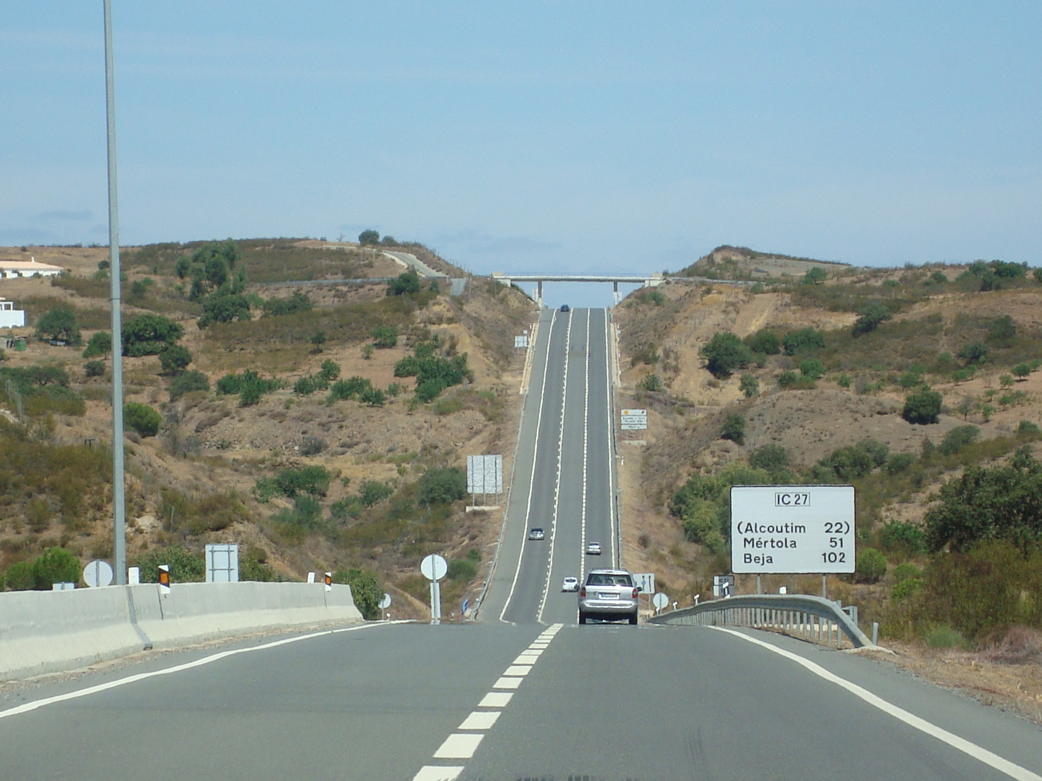 Imagen de la carretera IC27 en el Algarve, Portugal.